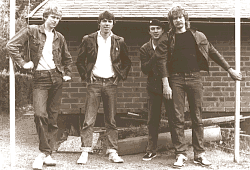 Rune Strutz 1978